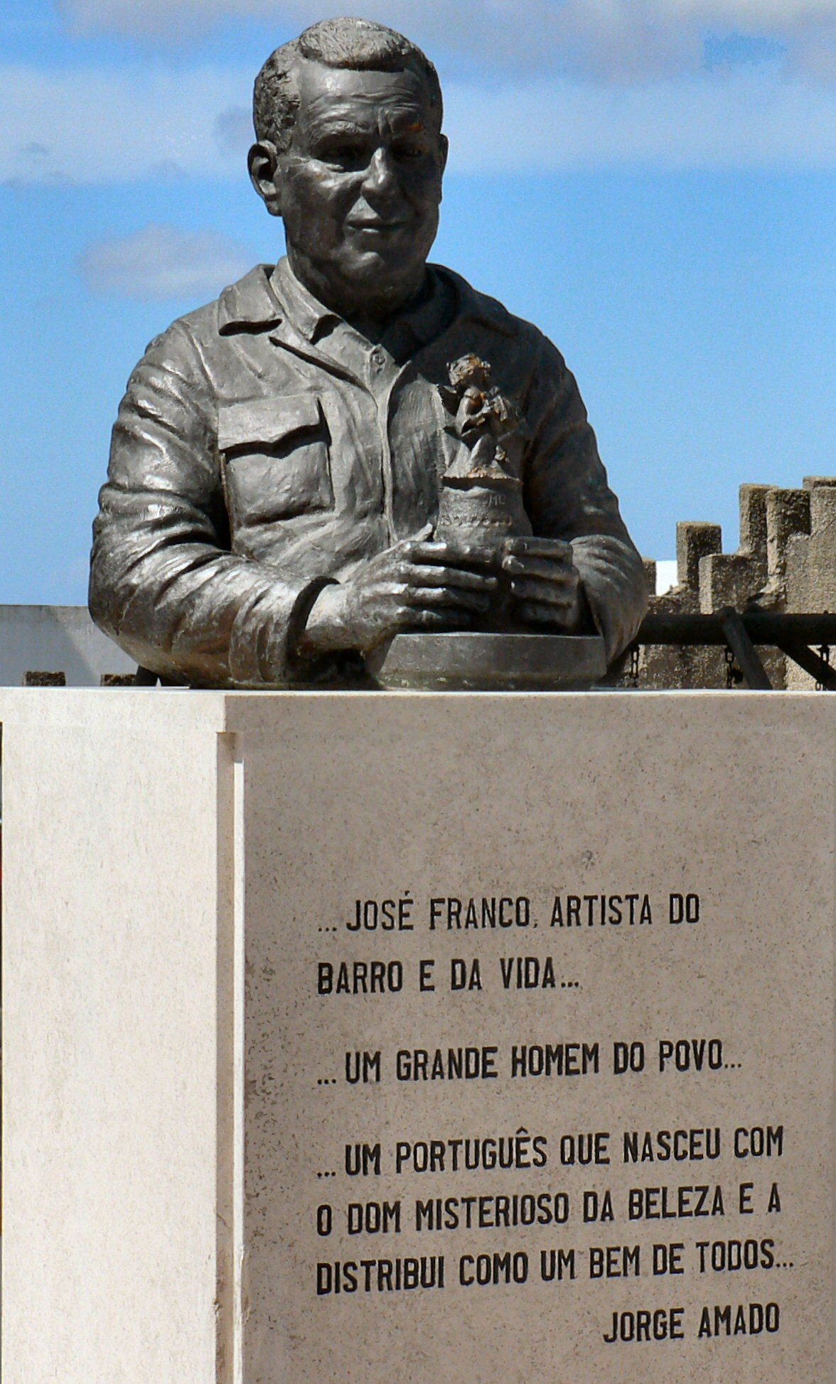 Busto de José Franco na Aldeia típica de José Franco Autor: Paulo Juntas